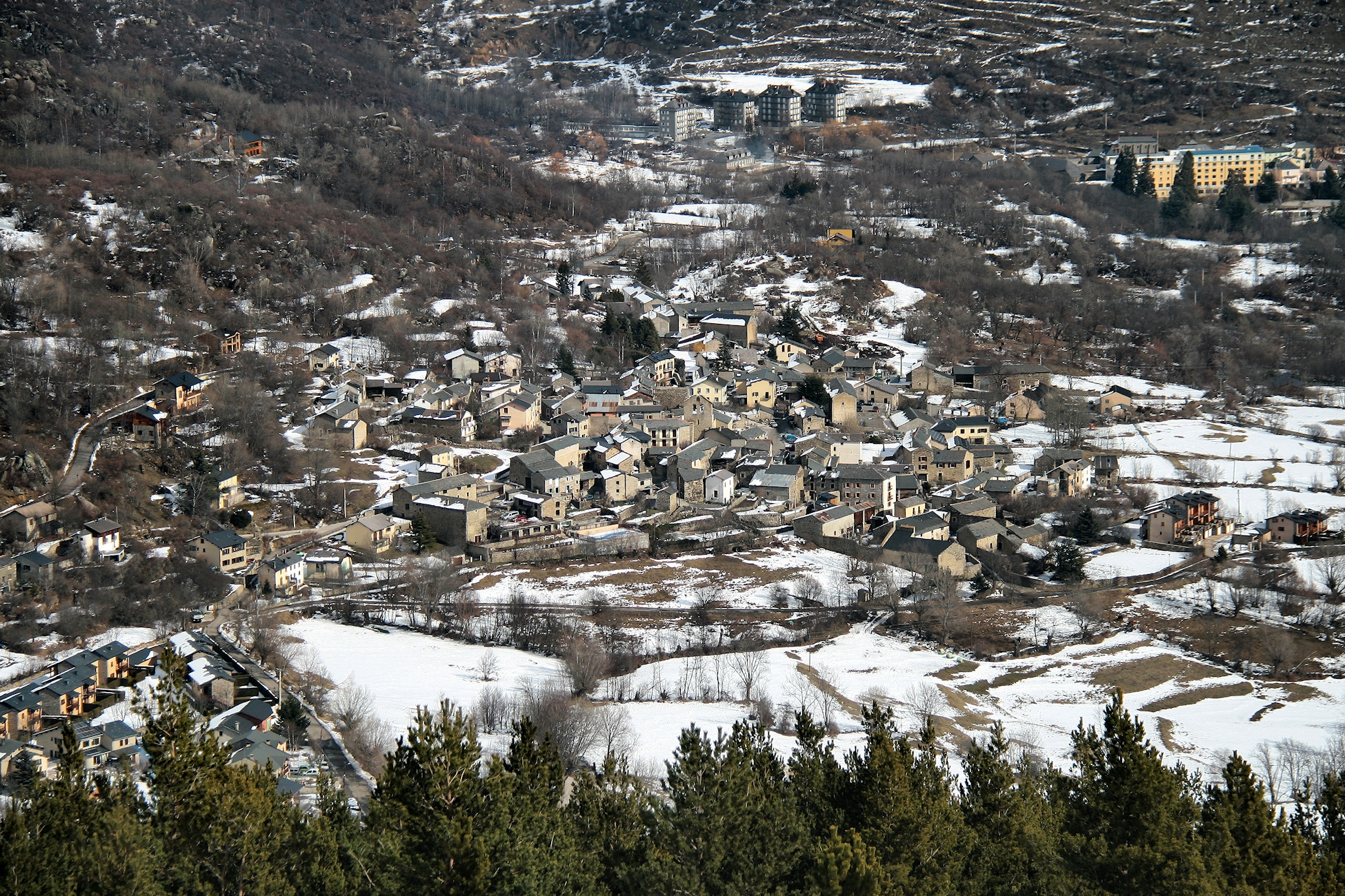 Dorres